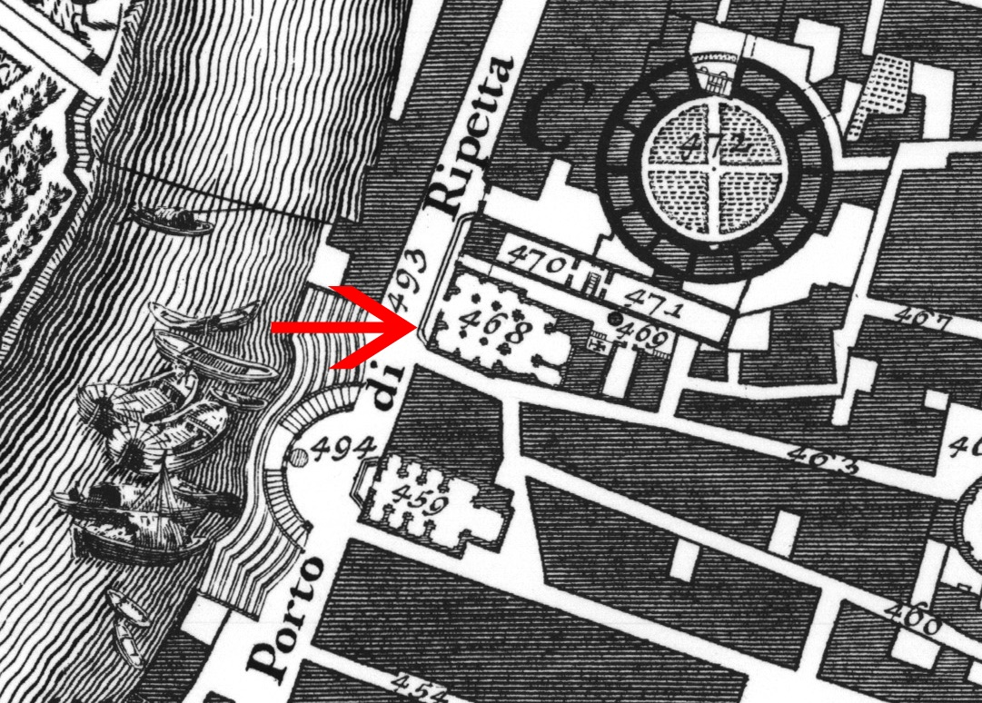 Pianta di Nolli